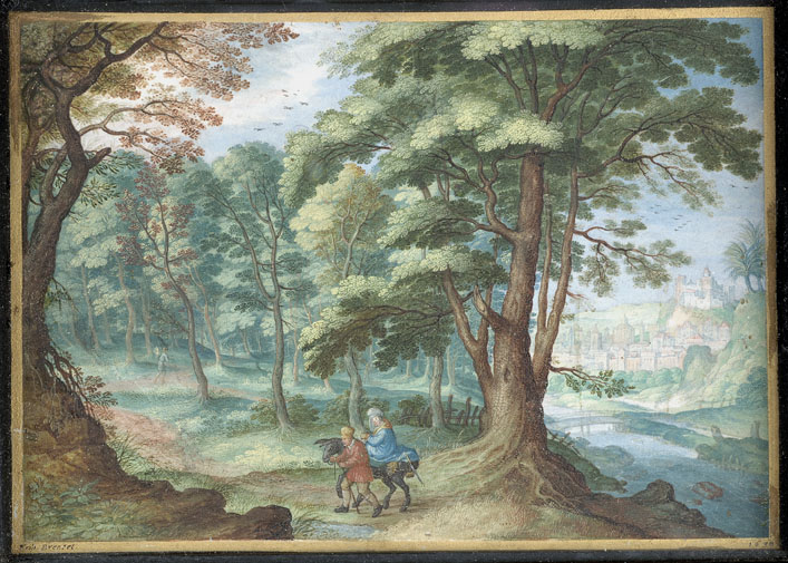 Friedrich Brentel - Flucht aus Ägypten (Gouche auf Velinpapier)